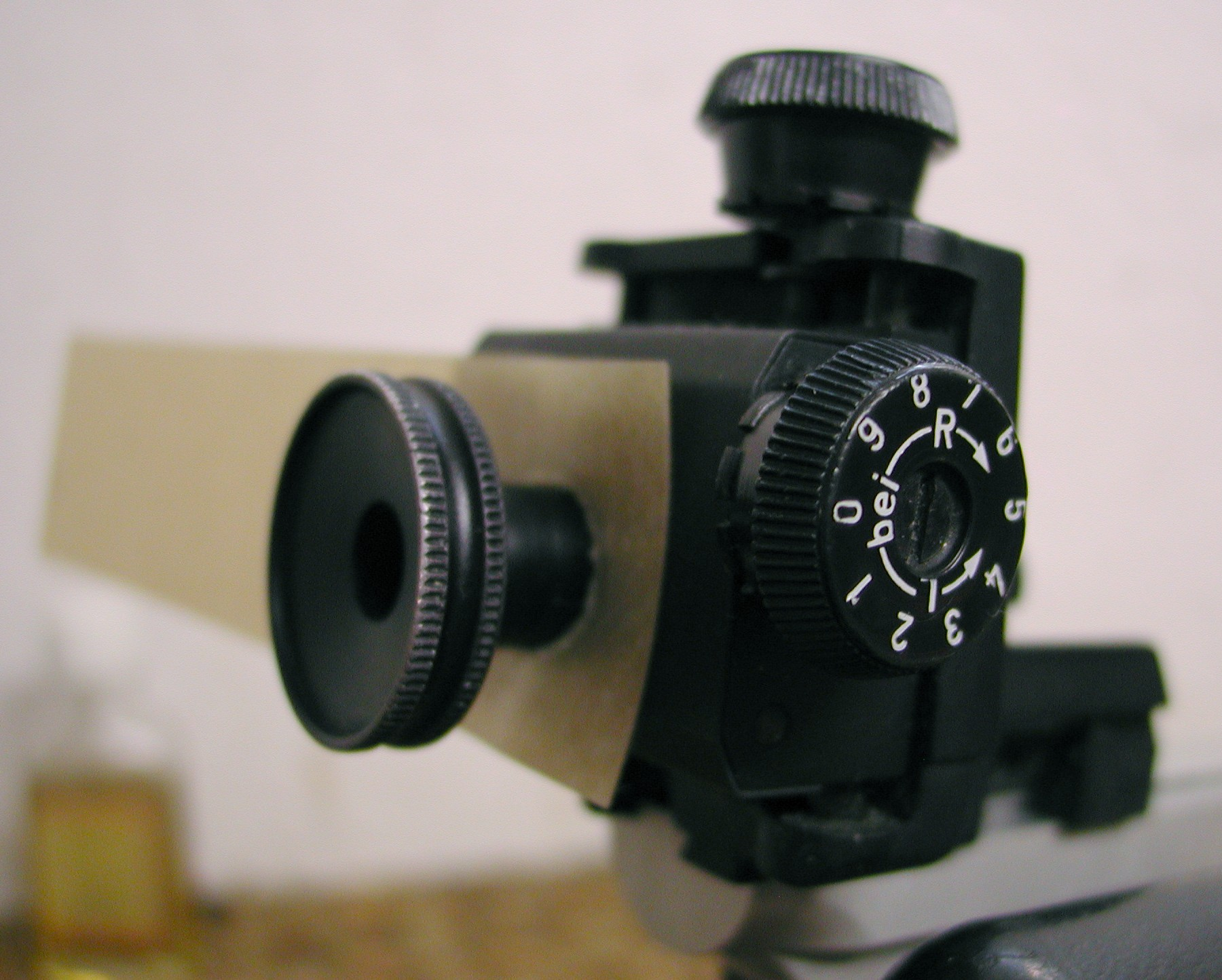 Diopter Motiv: Diopter bei einem Luftgewehr Foto: Wilfried Wittkowsky, 2005